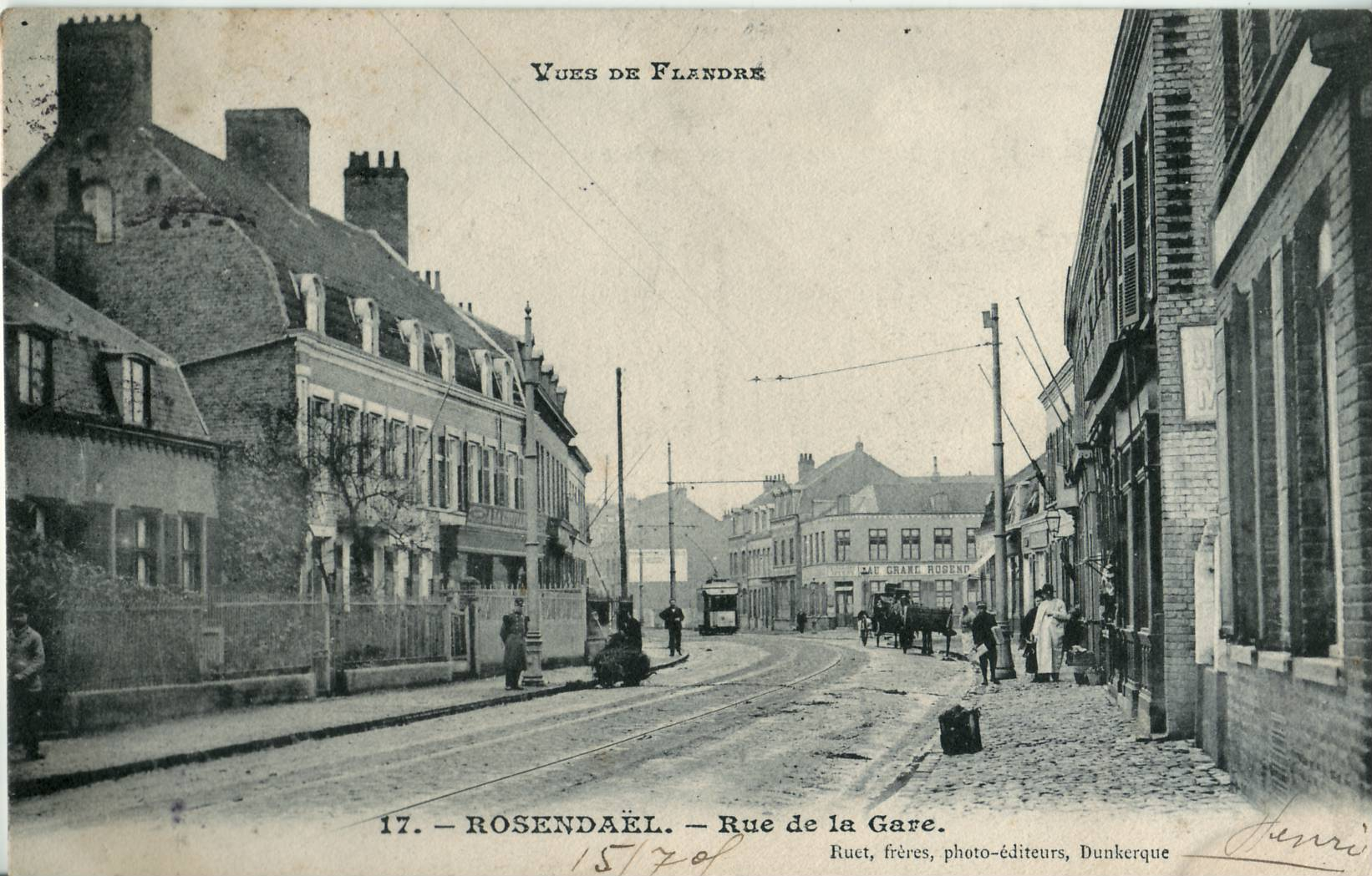 Carte postale ancienne éditée par Ruet frères, photo-éditeurs à Dunkerque, collection Vues de Flandre, n°17 : ROSENDAËL- Rue de la Gare